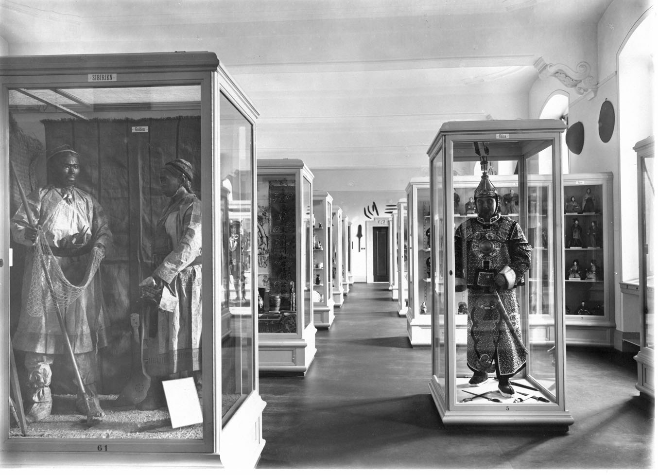 Historisches und Völkerkundemuseum St. Gallen: Historische Aufnahme der Daueraustellung